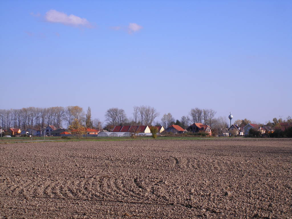 Pataš (Csilizpatas), obec v okrese Dunajská Streda na jižním Slovensku, pohled z nedalekého pole